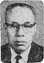 이상철, 국회의원, 내무부장관